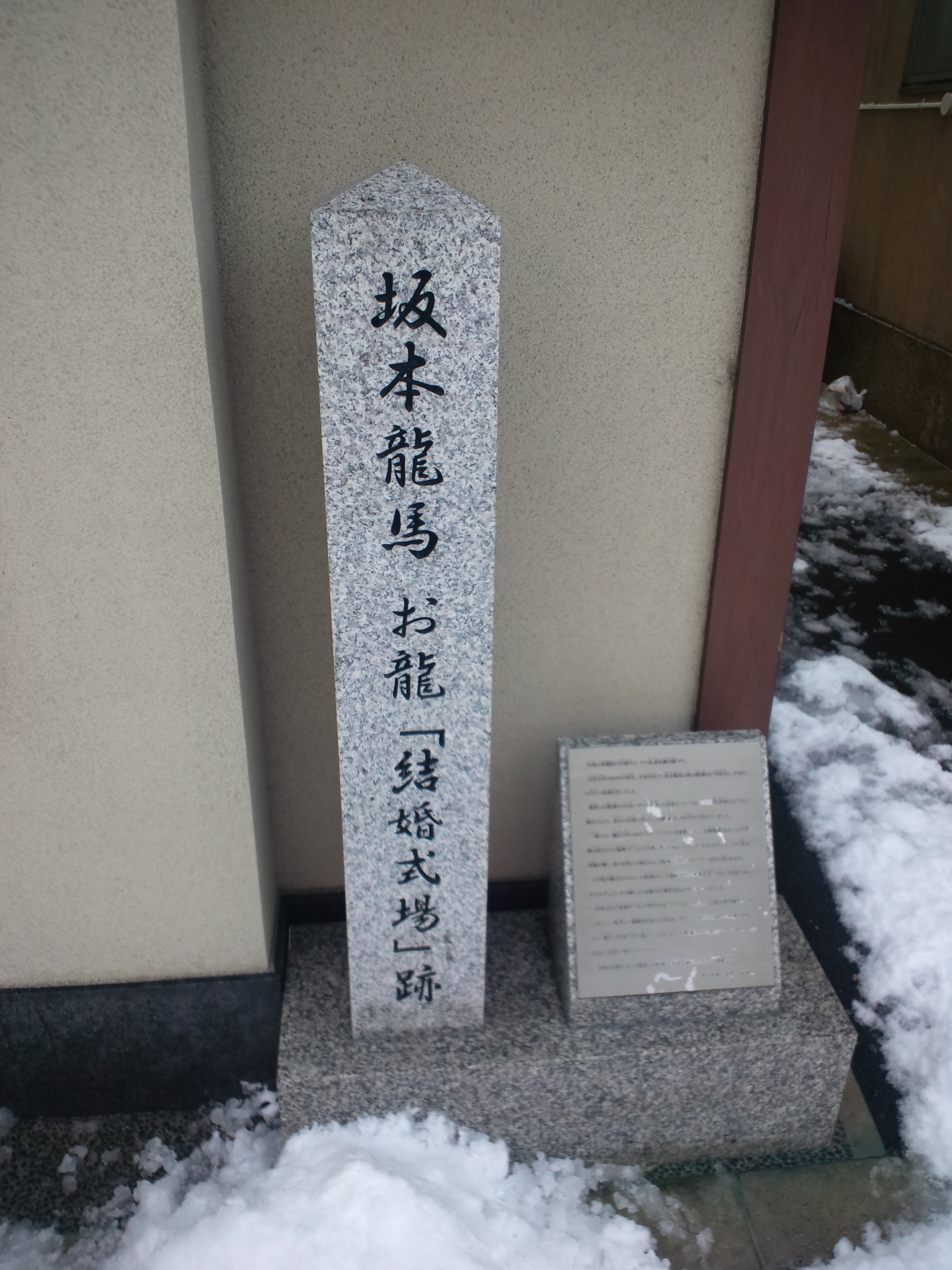 坂本龍馬 お龍「結婚式場」跡 石碑（京都市東山区・青蓮院塔頭金蔵寺跡）